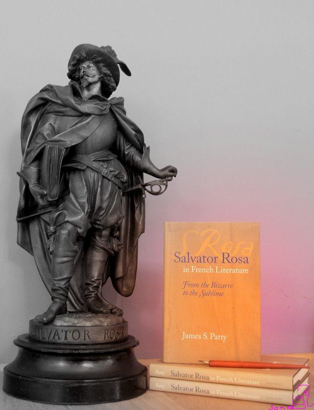 Hommage à l'écrivain